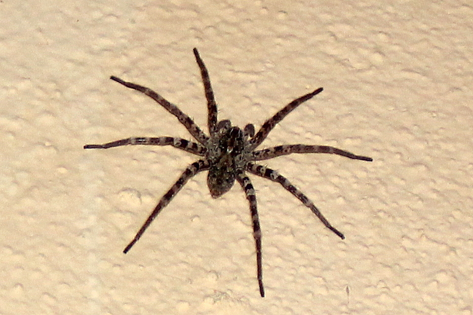 viridasius fasciatus in Isalo